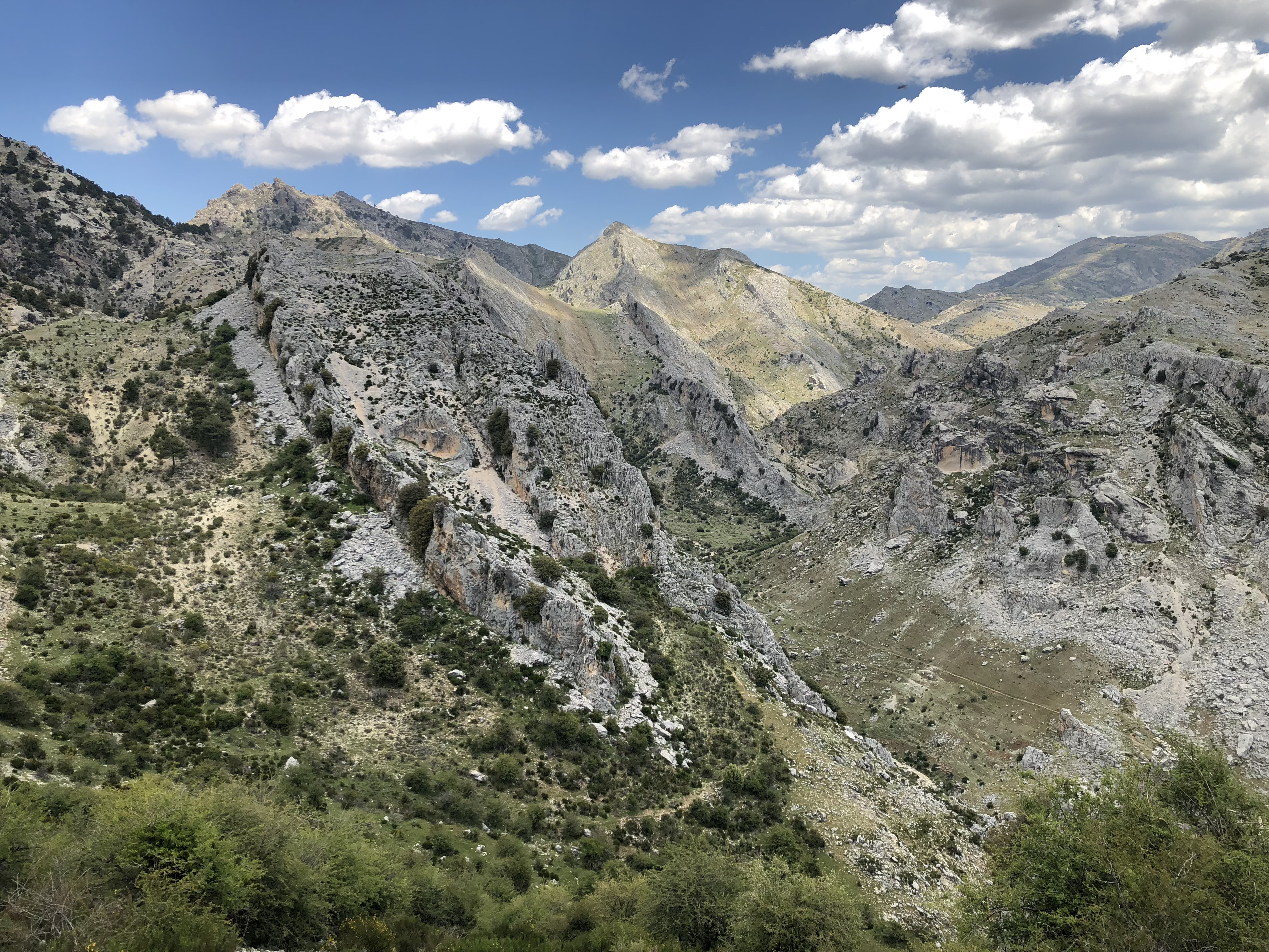 Sierra de Castril, España